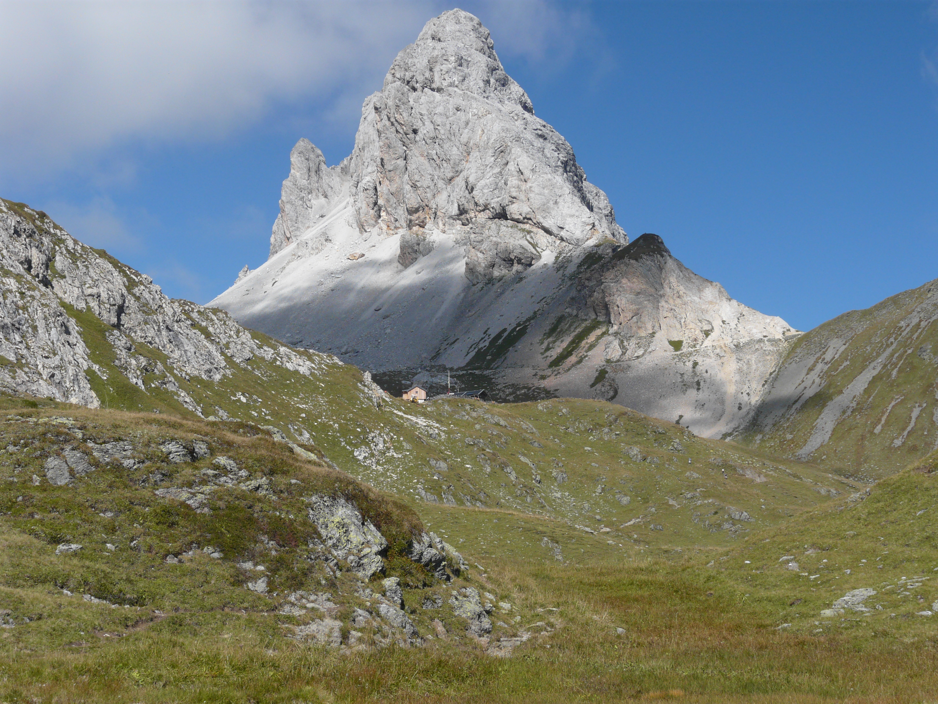 Die Filmor-Standschützenhütte vor der Großen Kinigat in den Karnischen Alpen.